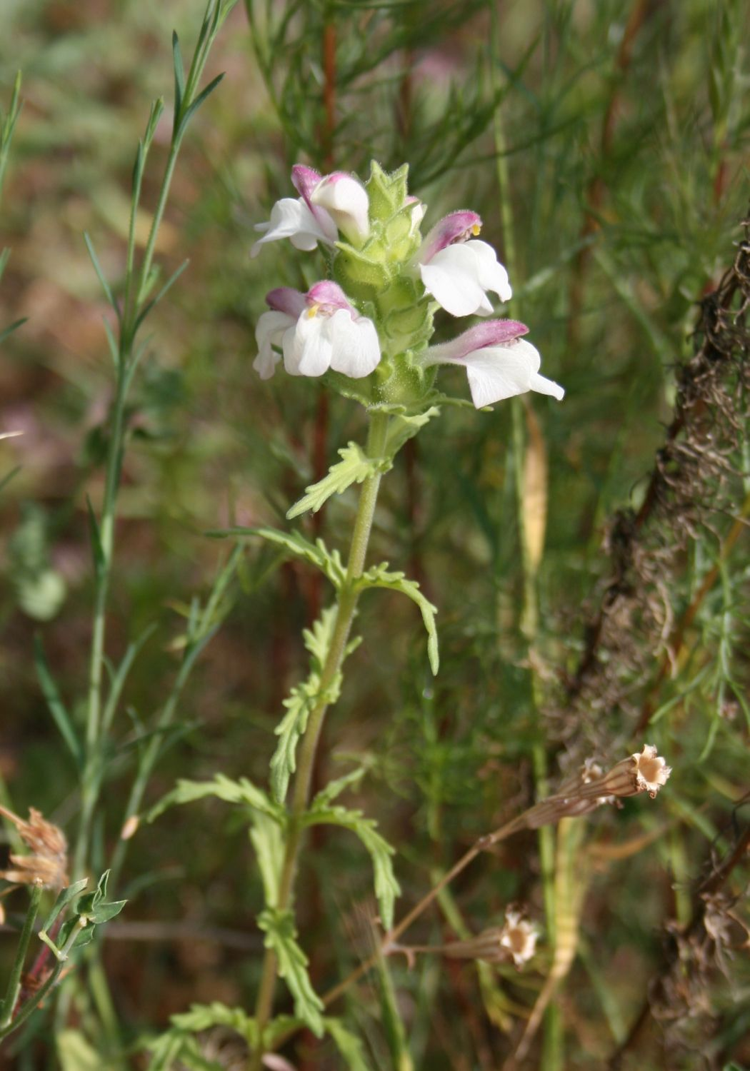 Bartsia trixago, Sommerwurzgewächse (Orobanchaceae) - Italien/Italia/Italy: Kalabrien/Calabria, Prov. Reggio Calabria, Aspromonte, bei San Peri, SSE Scilla